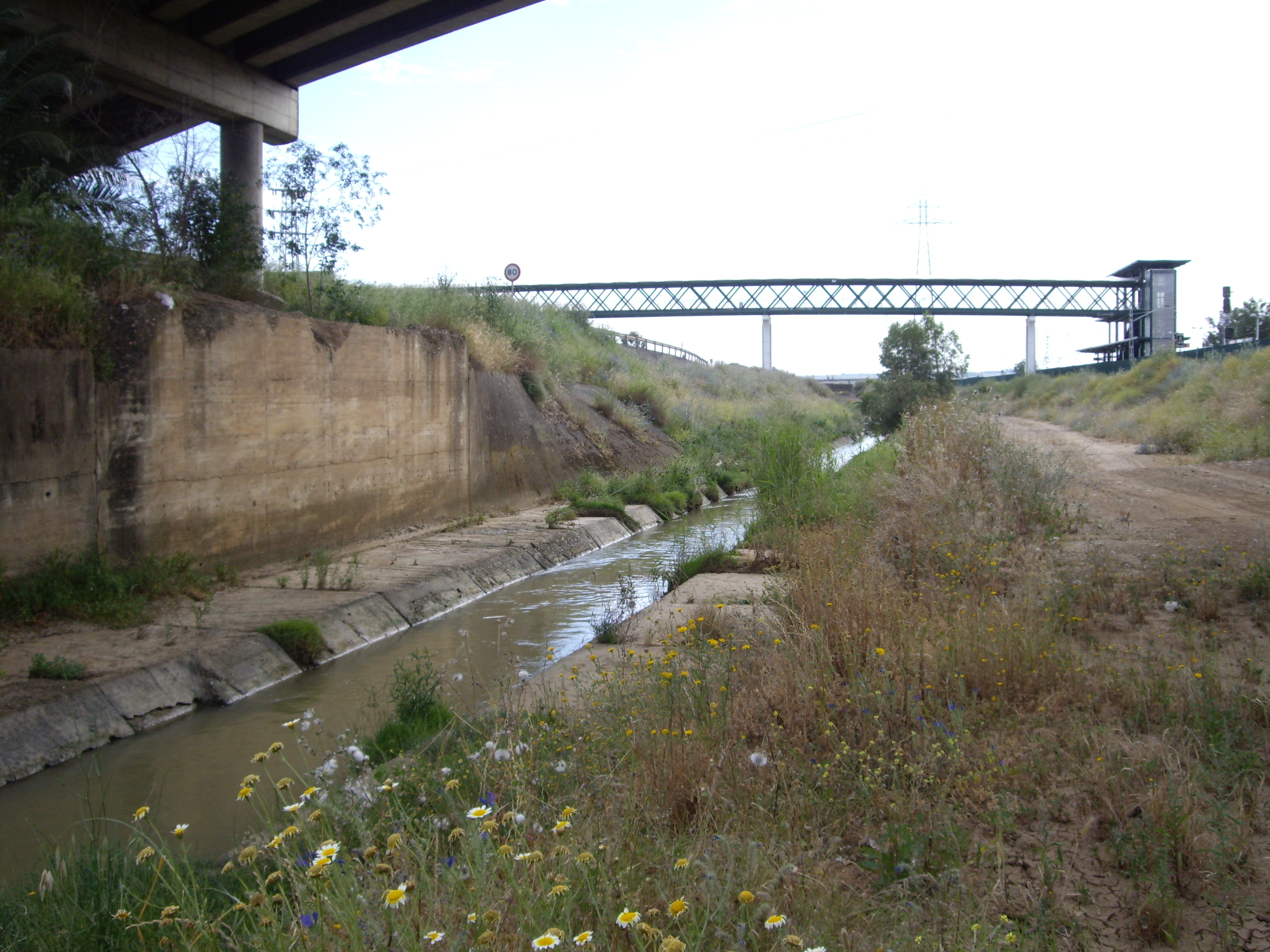 El arroyo del Tamarguillo a su paso por San Jerónimo. Al fondo puede verse el puente de la estación de Renfe de San Jerónimo.